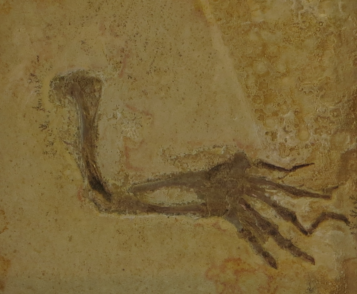 Fossil of Eurysternum- Took the picture at Natural History Museum, Bonn University